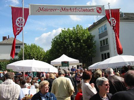 Marktfrühstück, März bis November, samstags in Mainz auf dem Liebfrauenplatz